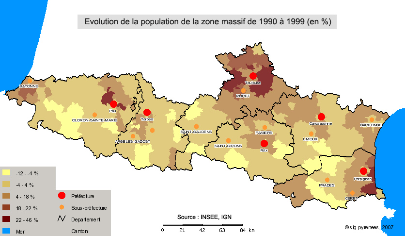 section Démographie. Auteur : Assemblée Pyrénéenne d'Economie Montagnarde (APEM). Oeuvre personelle.